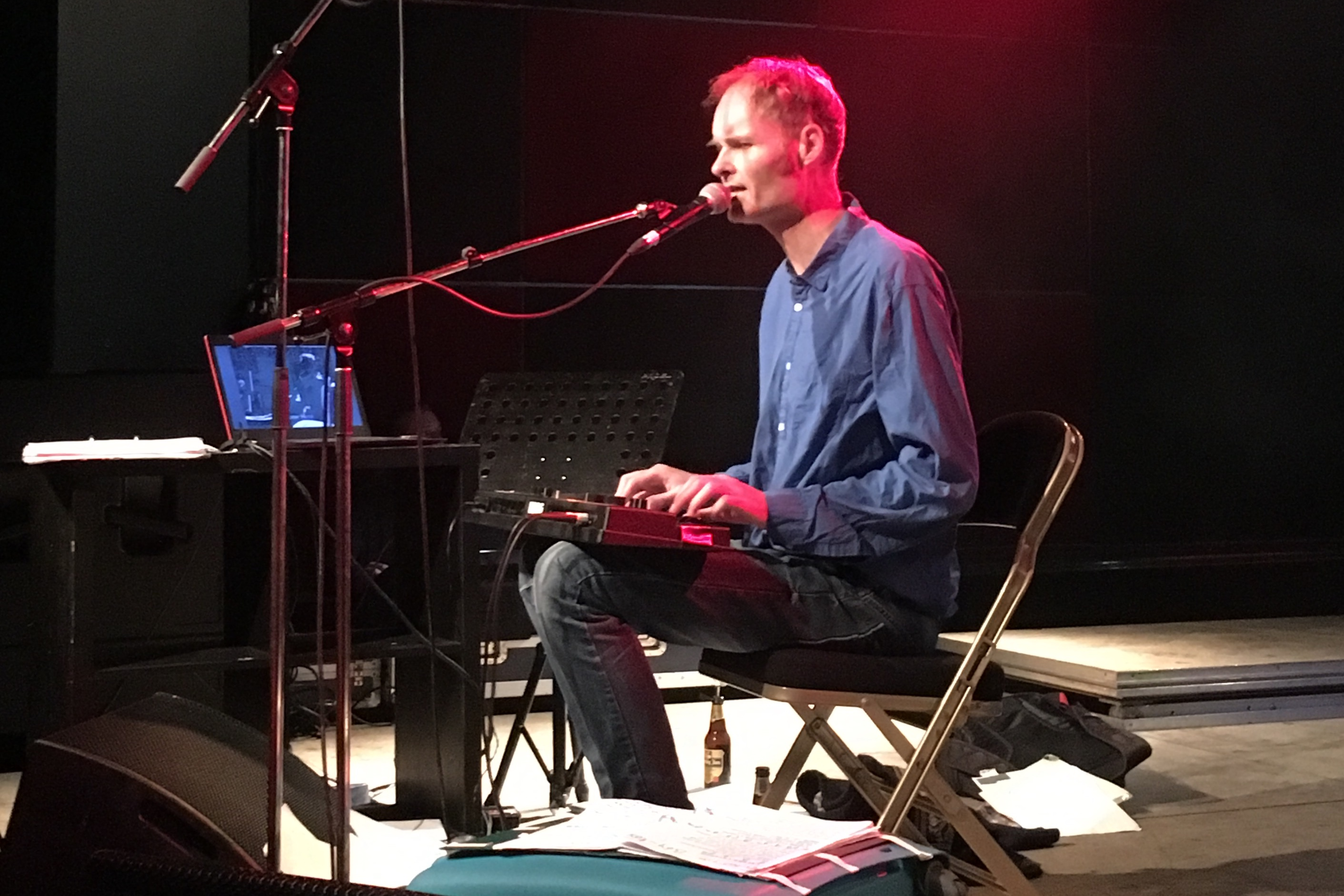 Meindert Talma Tijdens optreden in Vera